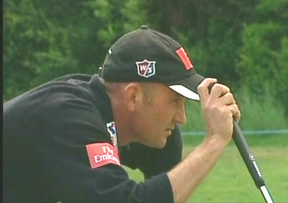 Bildbeschreibung: Markus Brier bei den Austrian Open 2006 Quelle: eigene Aufnahme mit einer Handycam Fotograf/Zeichner: Boss 15:50, 11 June 2006 (UTC) Datum: 10.6.2006 Sonstiges: GNU